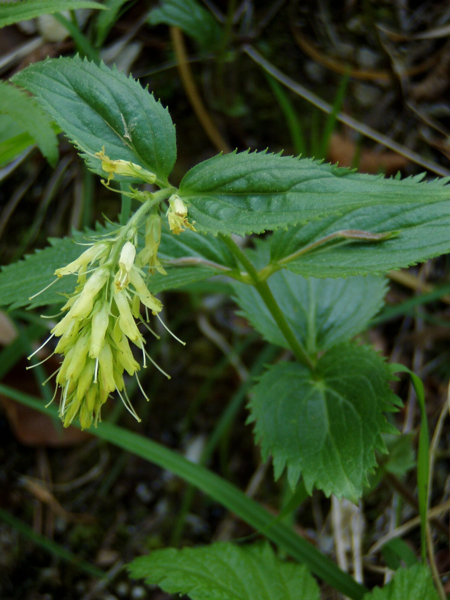 Paederota lutea. Tscheppaschlucht, Loibltal, Karawanken, Südkärnten (Carinthia), 600-650 m.